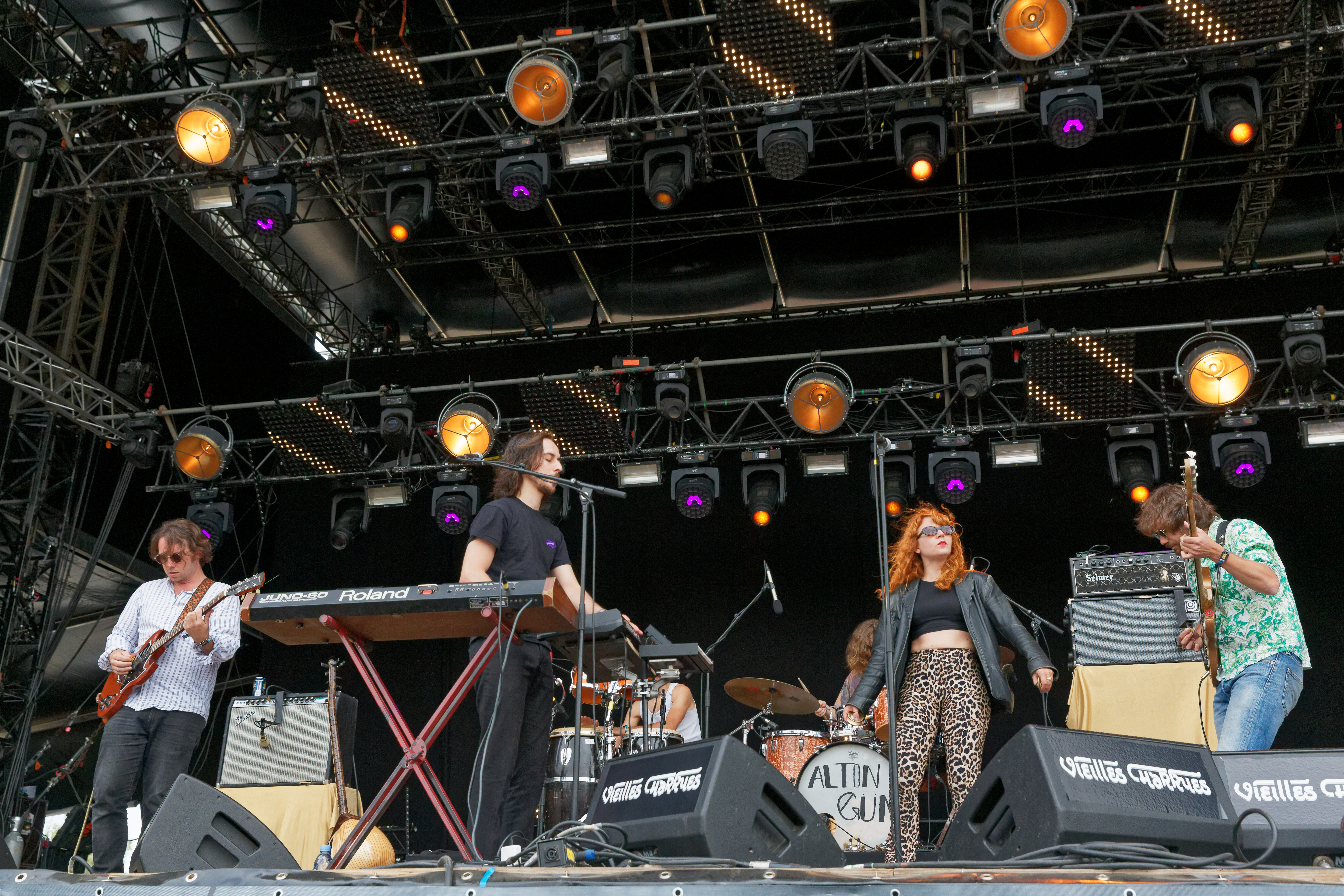 Altin Gün en concert lors du festival des vieilles charrues 2018.